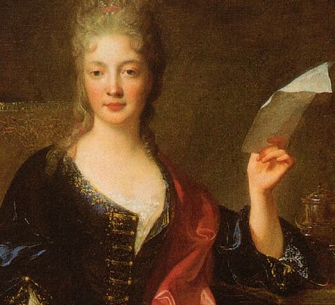 Elisabeth-Claude Jacquet de La Guerre (1665-1729, French composer) by François de Troy.